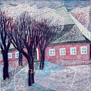 Gerhard Hermanns, Farbholzschnitt, Titel: Haubarg